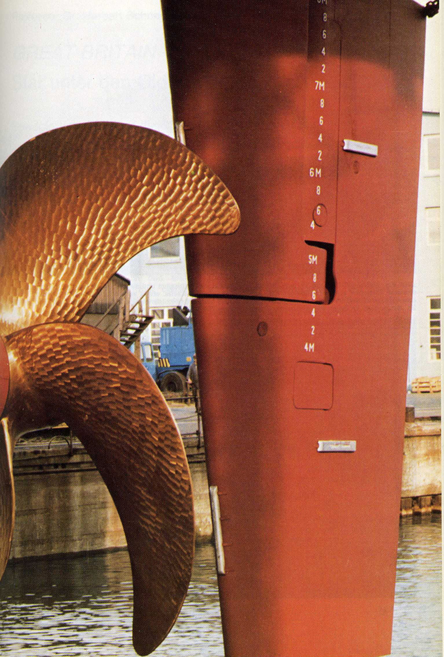 Schraube u. Ruder